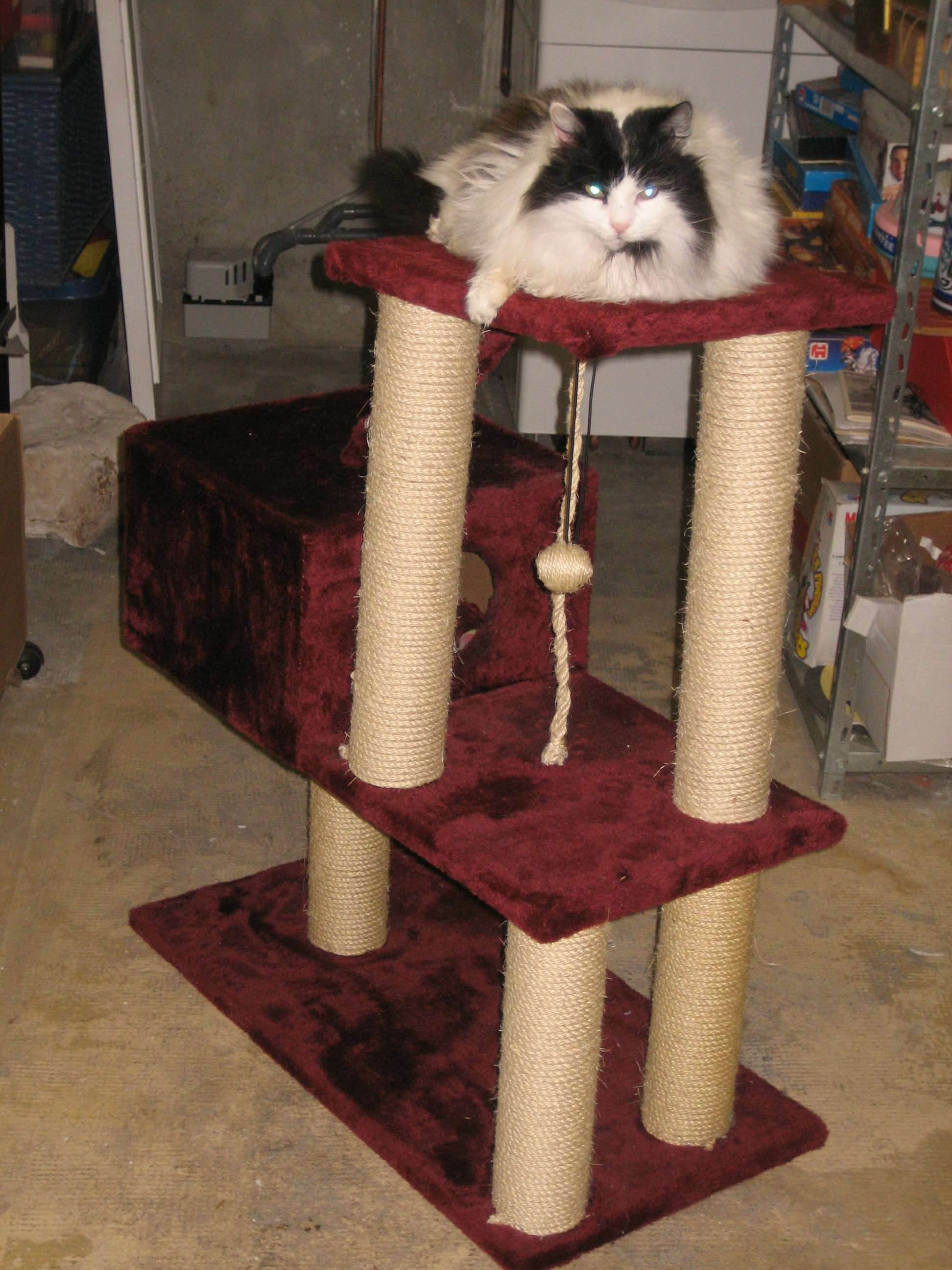 Un arbre à chat, structure en bois de divertissement pour les félins.